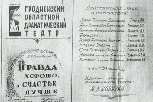 Фото театральной программки 1947 г.